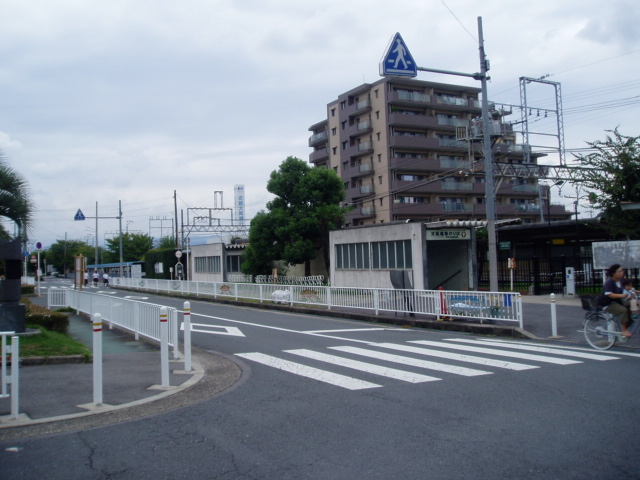 京阪電鉄 郡津駅(大阪府交野市) 2005年9月11日撮影 撮影機材:OLYMPUS μ15D 撮影者:Maechan0360